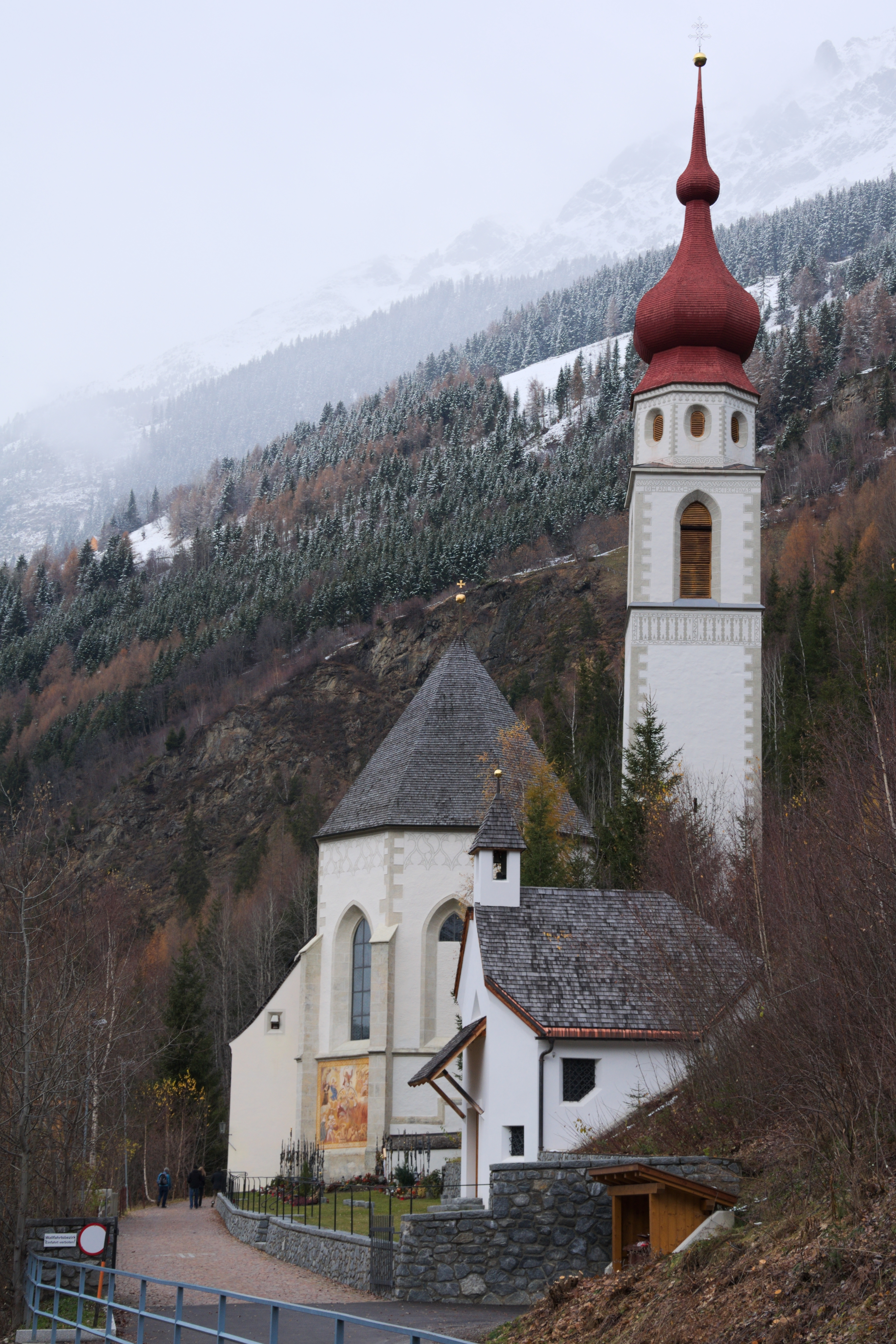 Kath. Pfarr- und Wallfahrtskirche Maria Himmelfahrt